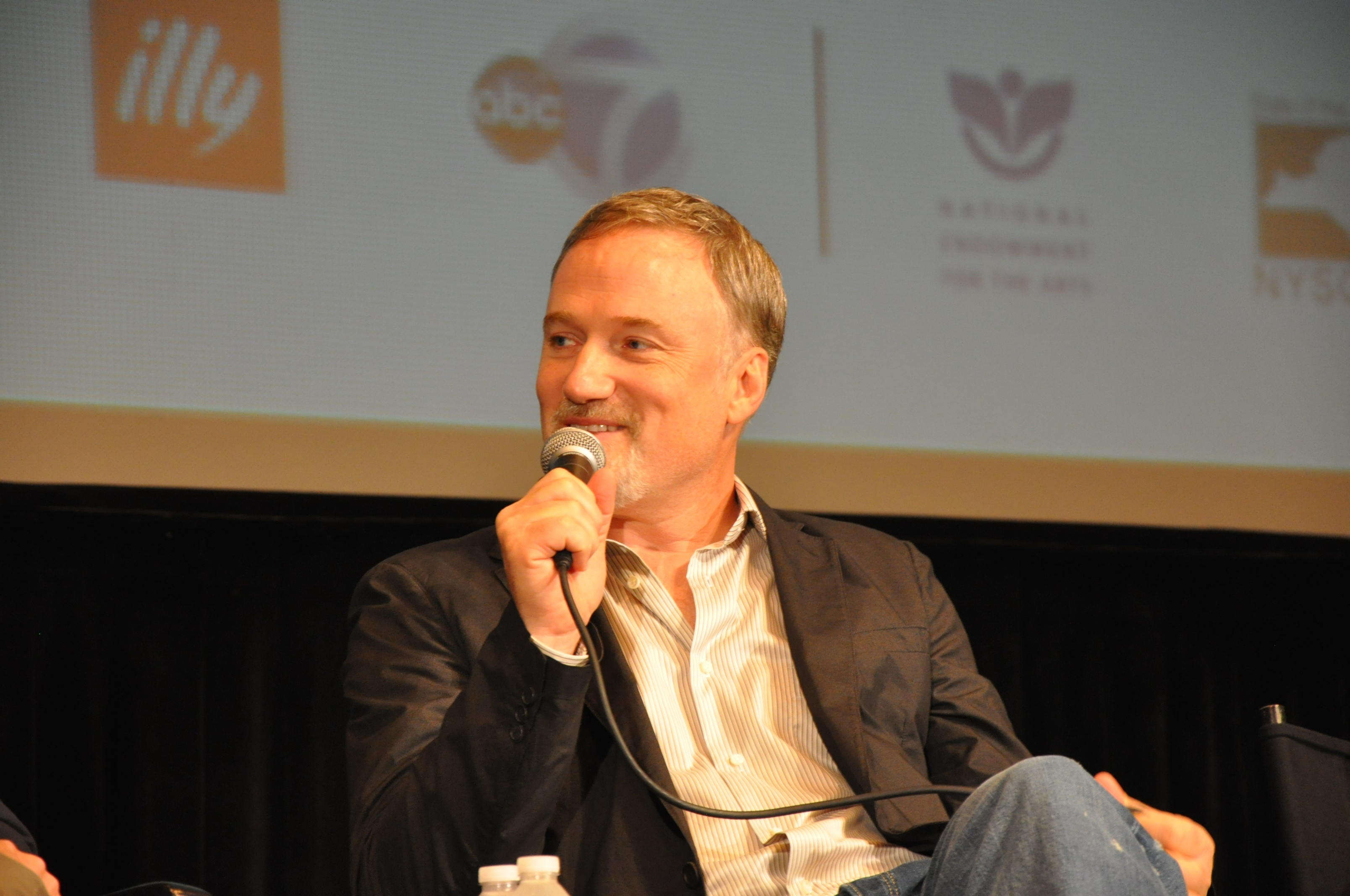 El director de cine David Fincher en el estreno de The social network en el Festival de Cine de Nueva York. 24 de septiembre de 2010.